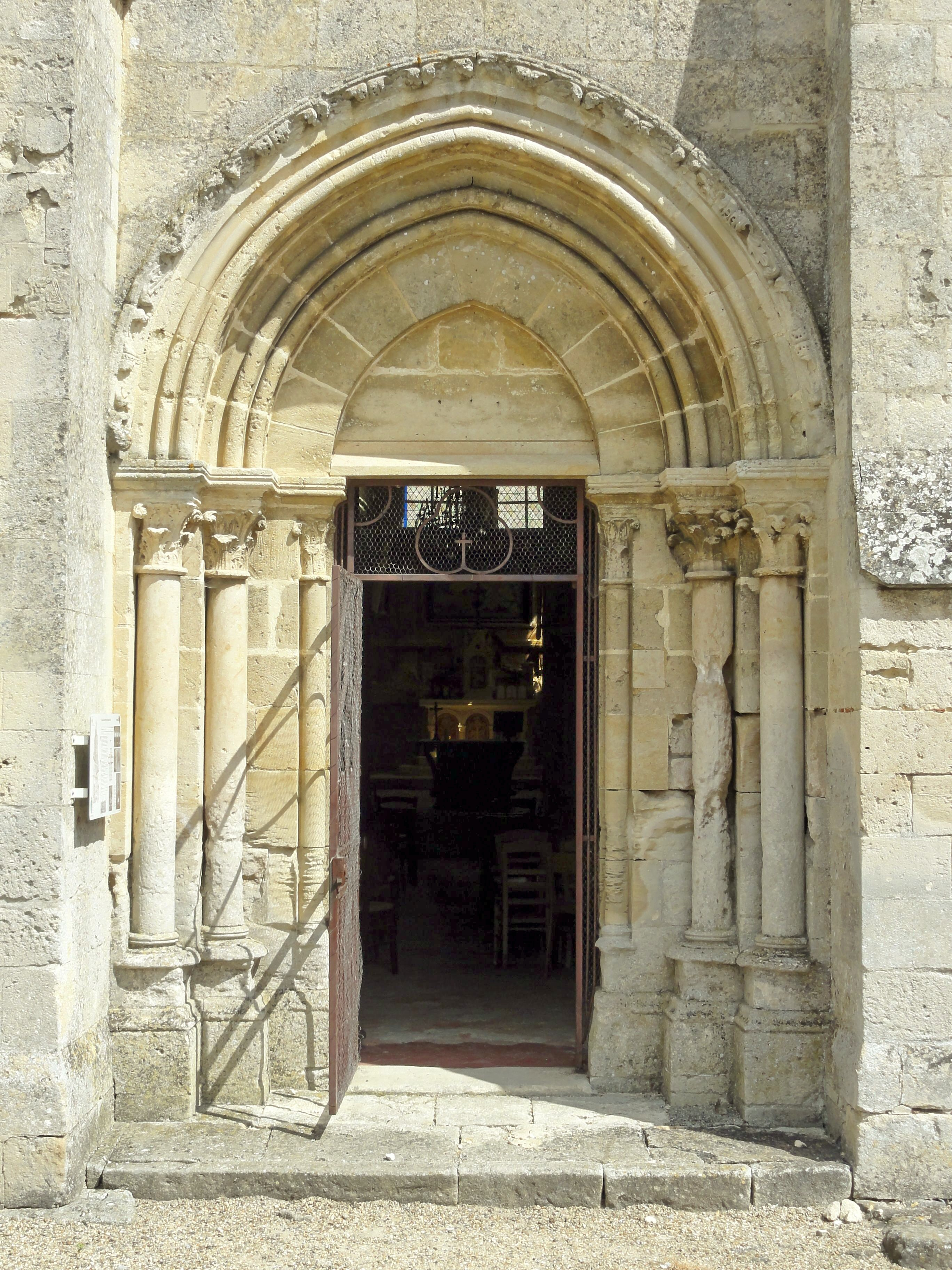 Portail occidental.